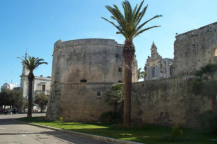 Castello di Palmariggi